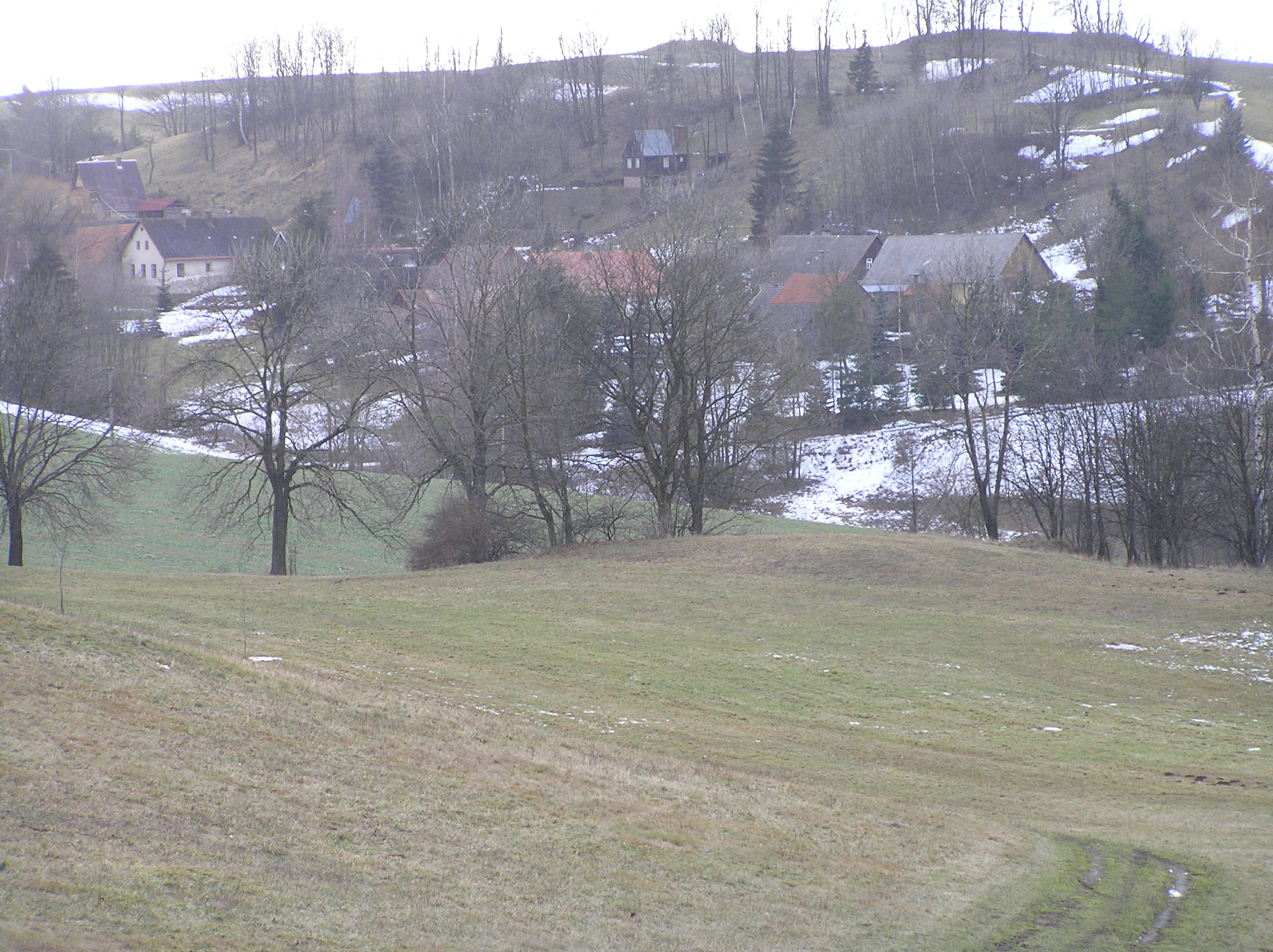 Osada Morcínov